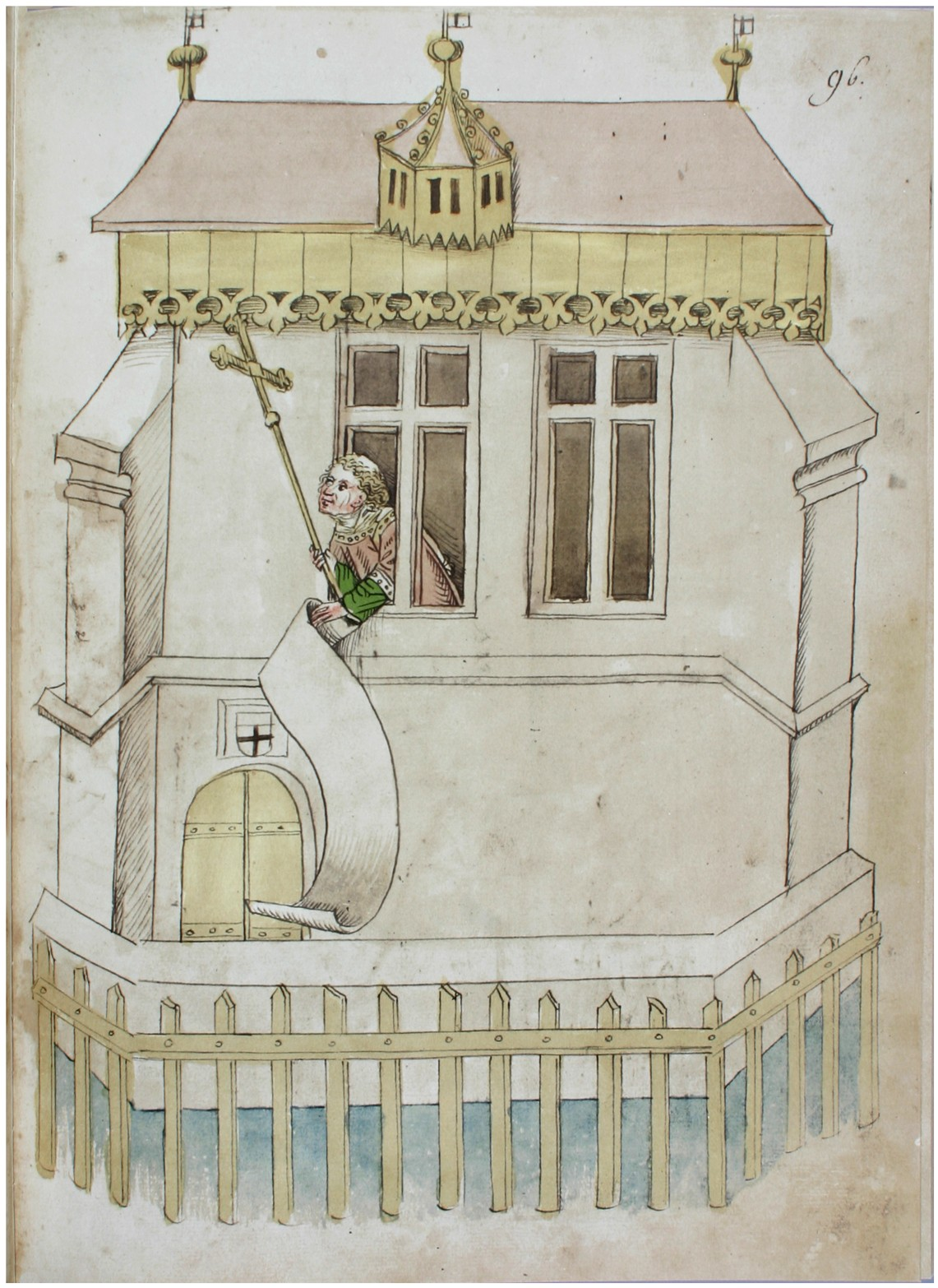 Rosgartenmuseum Konstanz, Hs. 1, Richental: Konzilschronik. In: Feger, Otto (Bearb.): Ulrich Richental: Das Konzil zu Konstanz. Faksimile. Starnberg - Konstanz 1964. Fol. 96r